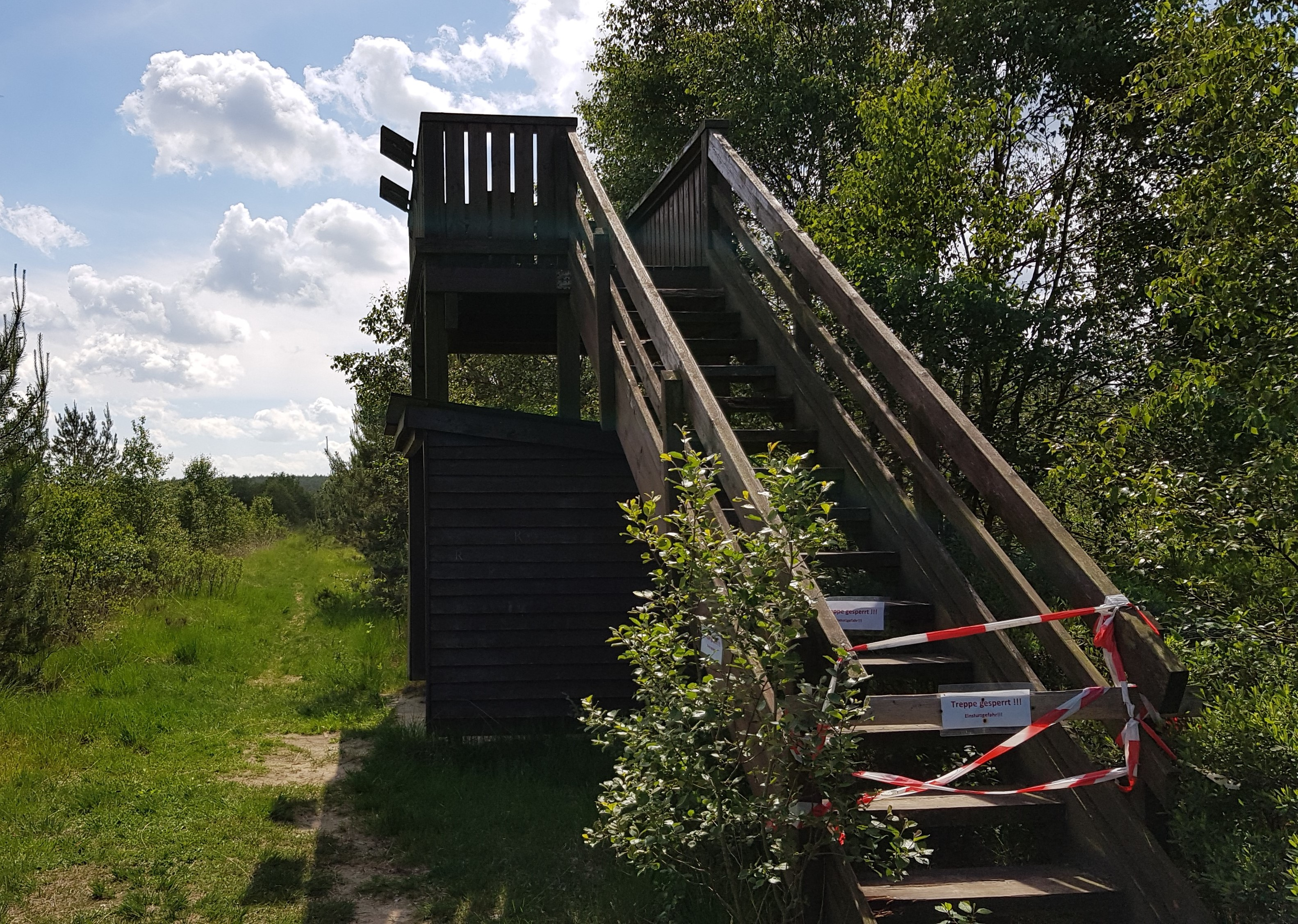 Aussichtsturm im südlichen Hagener Königsmoor, Sommer 2019